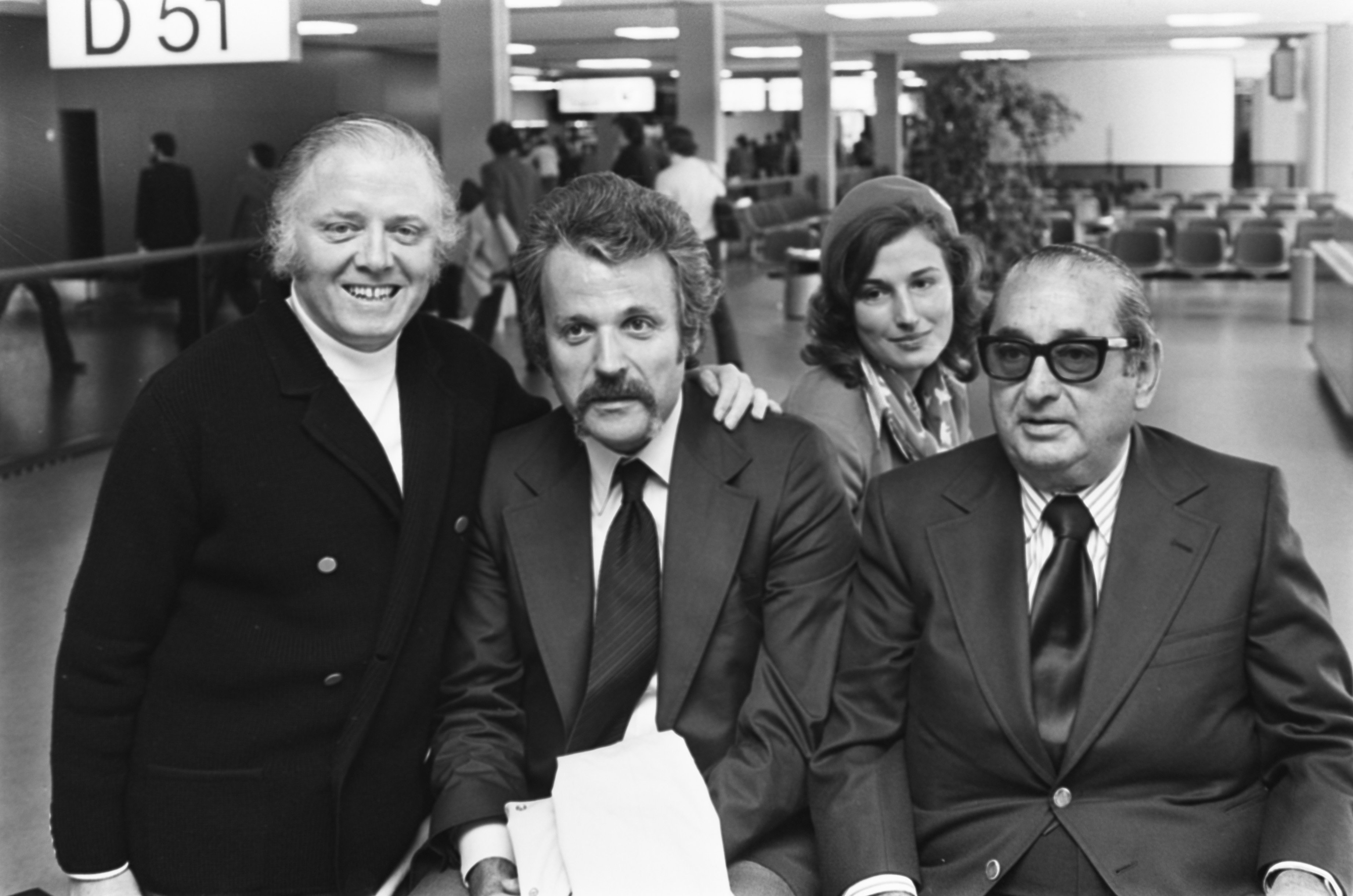 Collectie / Archief : Fotocollectie Anefo Reportage / Serie : De filmmakers van "Een brug te ver" komen aan op Schiphol i.v.m. de filmopnames in Nederland Beschrijving : V.l.n.r. regisseur Richard Attenborough, scenarioschrijver William Goldman en producent Joe Levine Datum : 24 juli 1975 Locatie : Noord-Holland, Schiphol Trefwoorden : aankomst en vertrek, groepsportretten, producenten, regisseurs Persoonsnaam : Attenborough, Richard, Goldman, William, Levine, Joe Fotograaf : Bert Verhoeff / Anefo Auteursrechthebbende : Nationaal Archief Materiaalsoort : Negatief (zwart/wit) Nummer archiefinventaris : bekijk toegang 2.24.01.05 Bestanddeelnummer : 928-0660